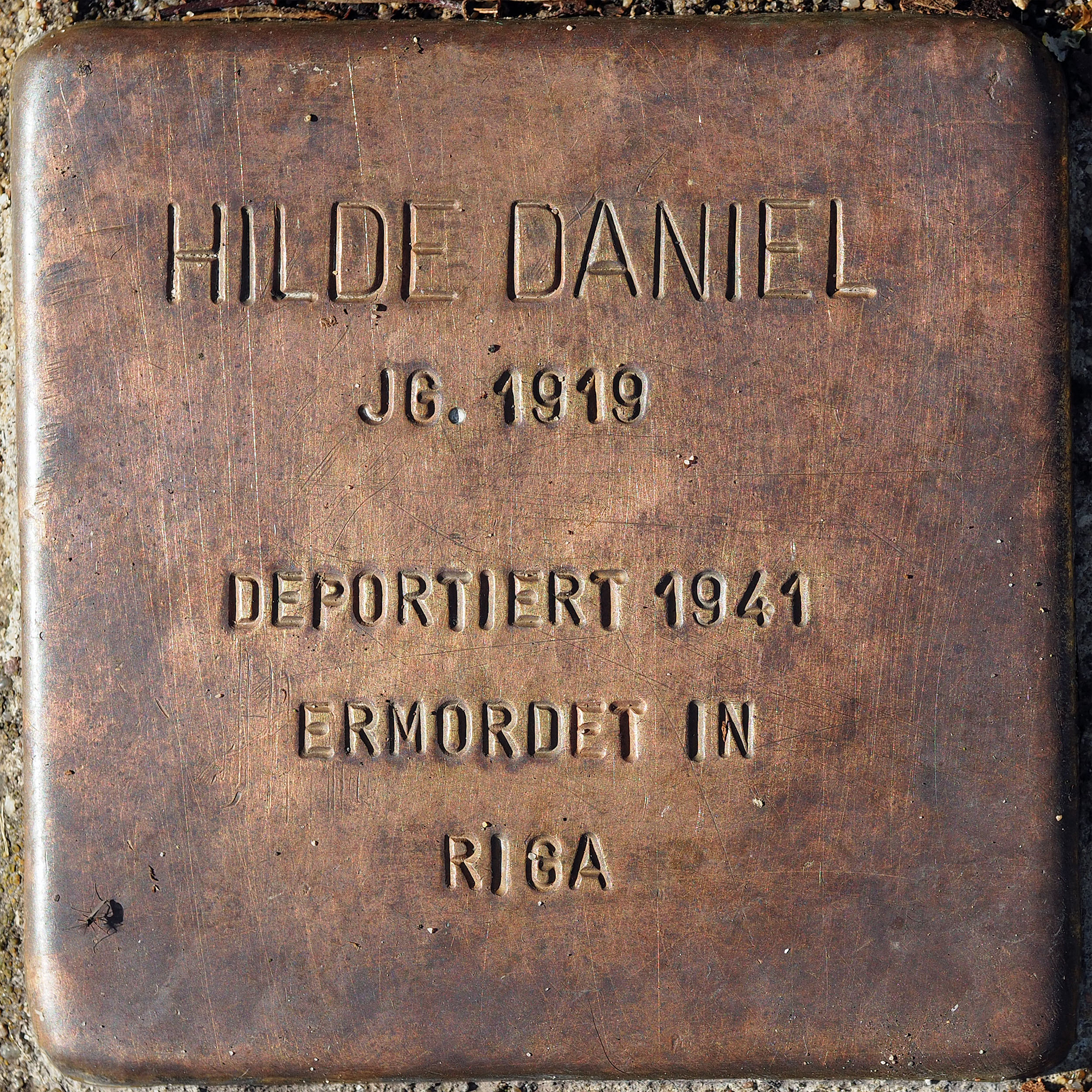 Stolperstein DU: Daniel, Hilde